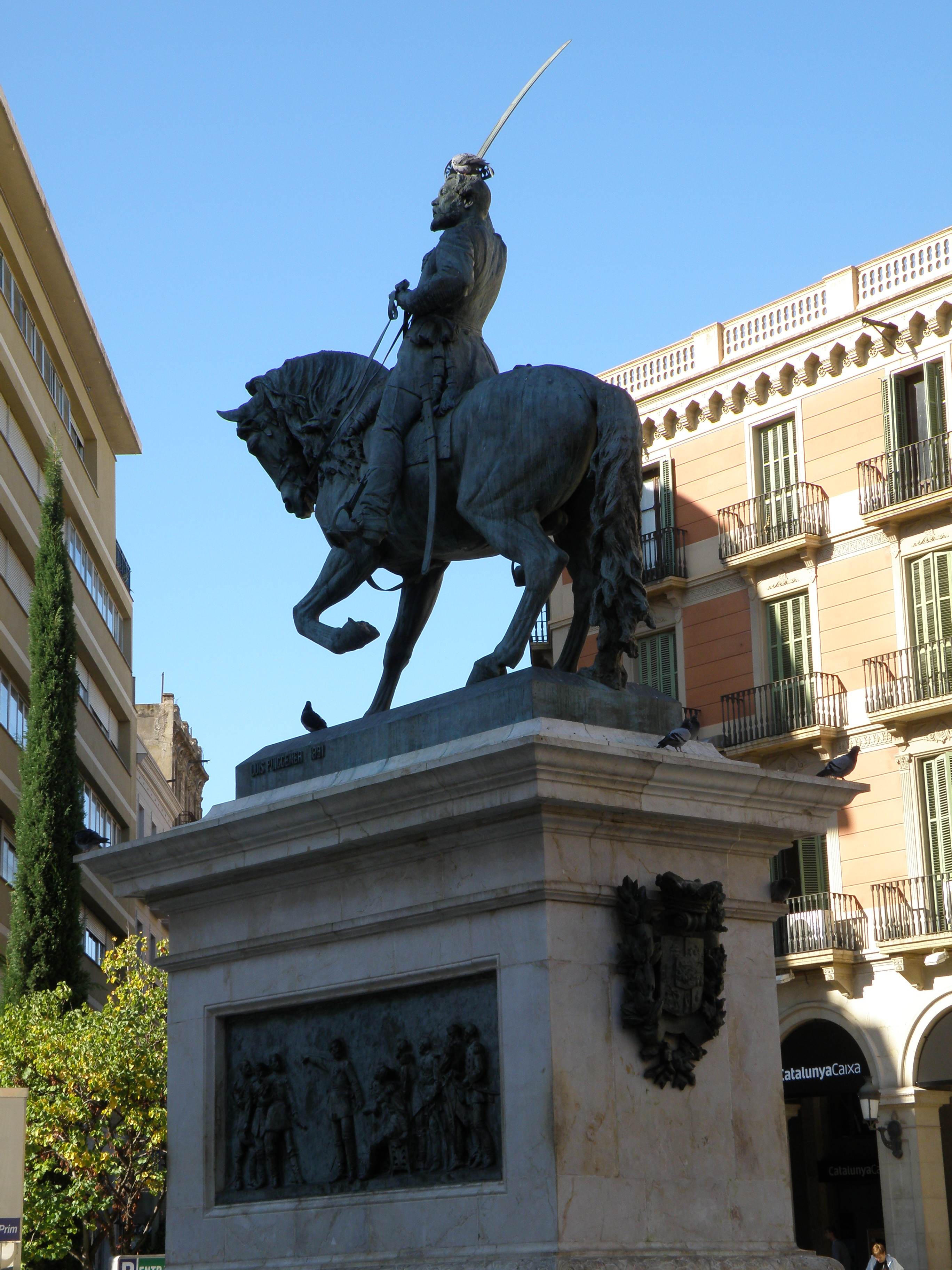 Vista de l'esquena del monument al General Prim, Reus, Baix Camp.